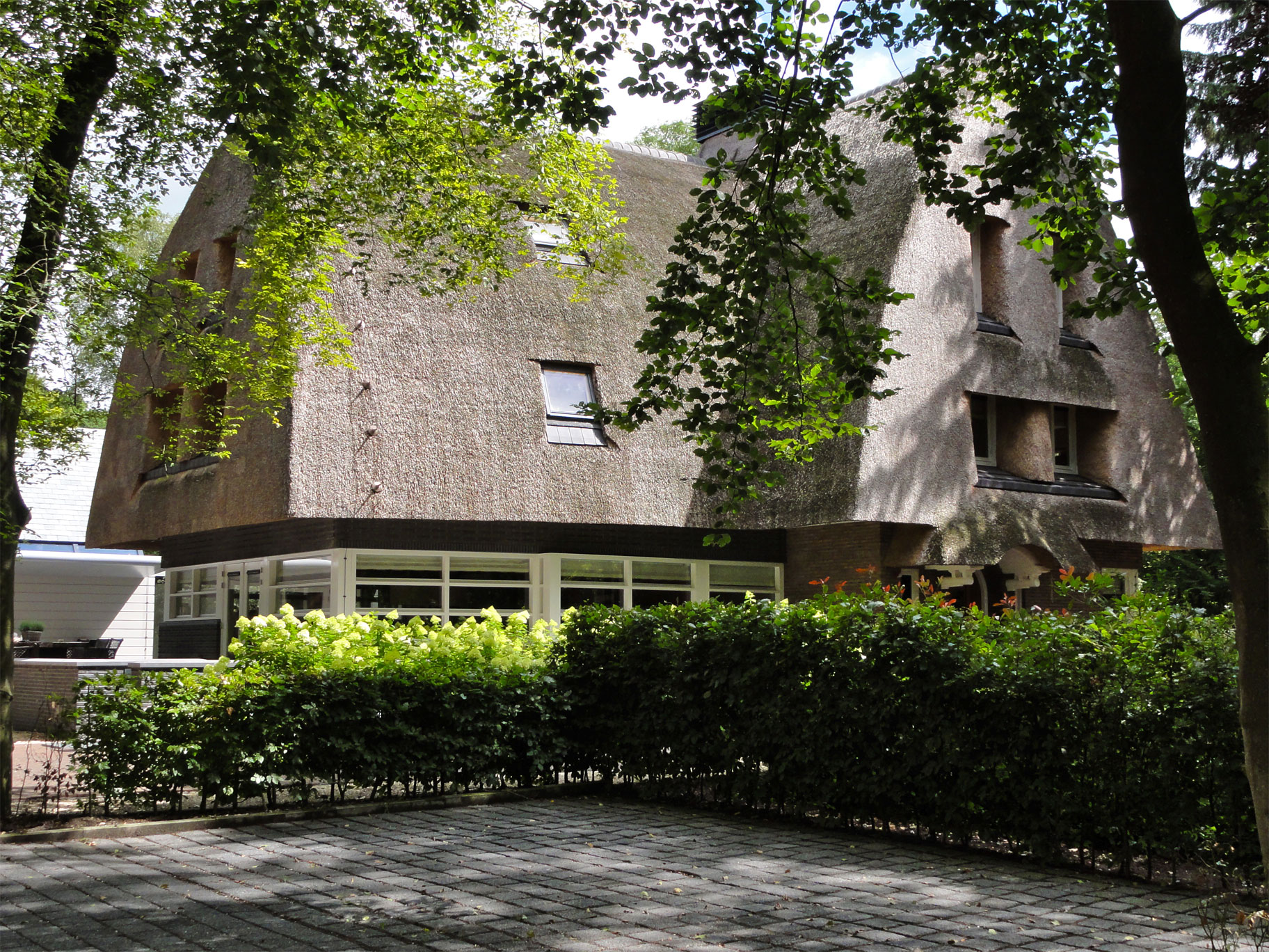 De Zandhoeve (westgevel), Hoofdstraat 89, Beetsterzwaag, gebouwd in 1929-'30 en ontworpen door de architect S.A. Veenstra (1897-1981).